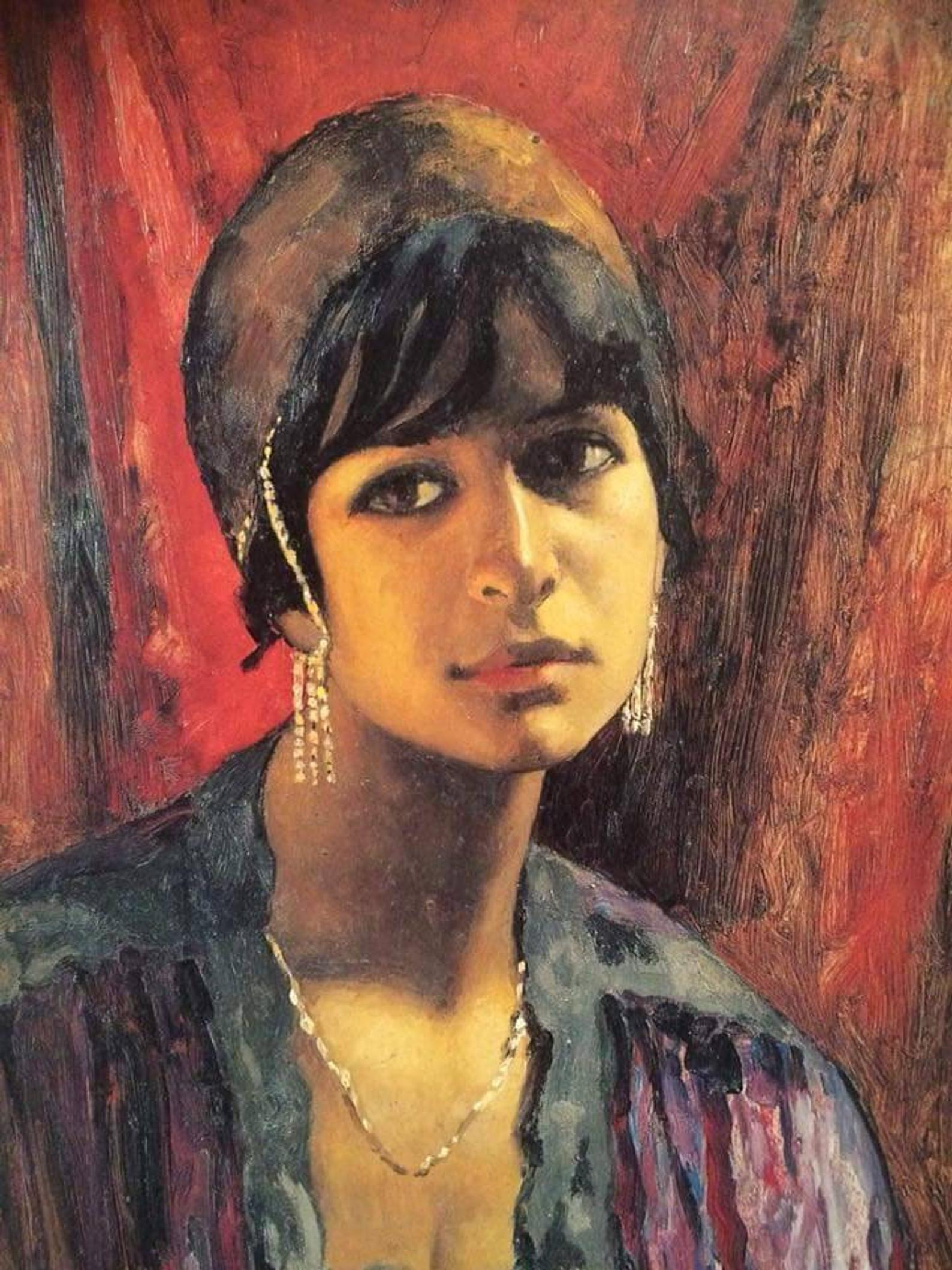 Frauenportrait